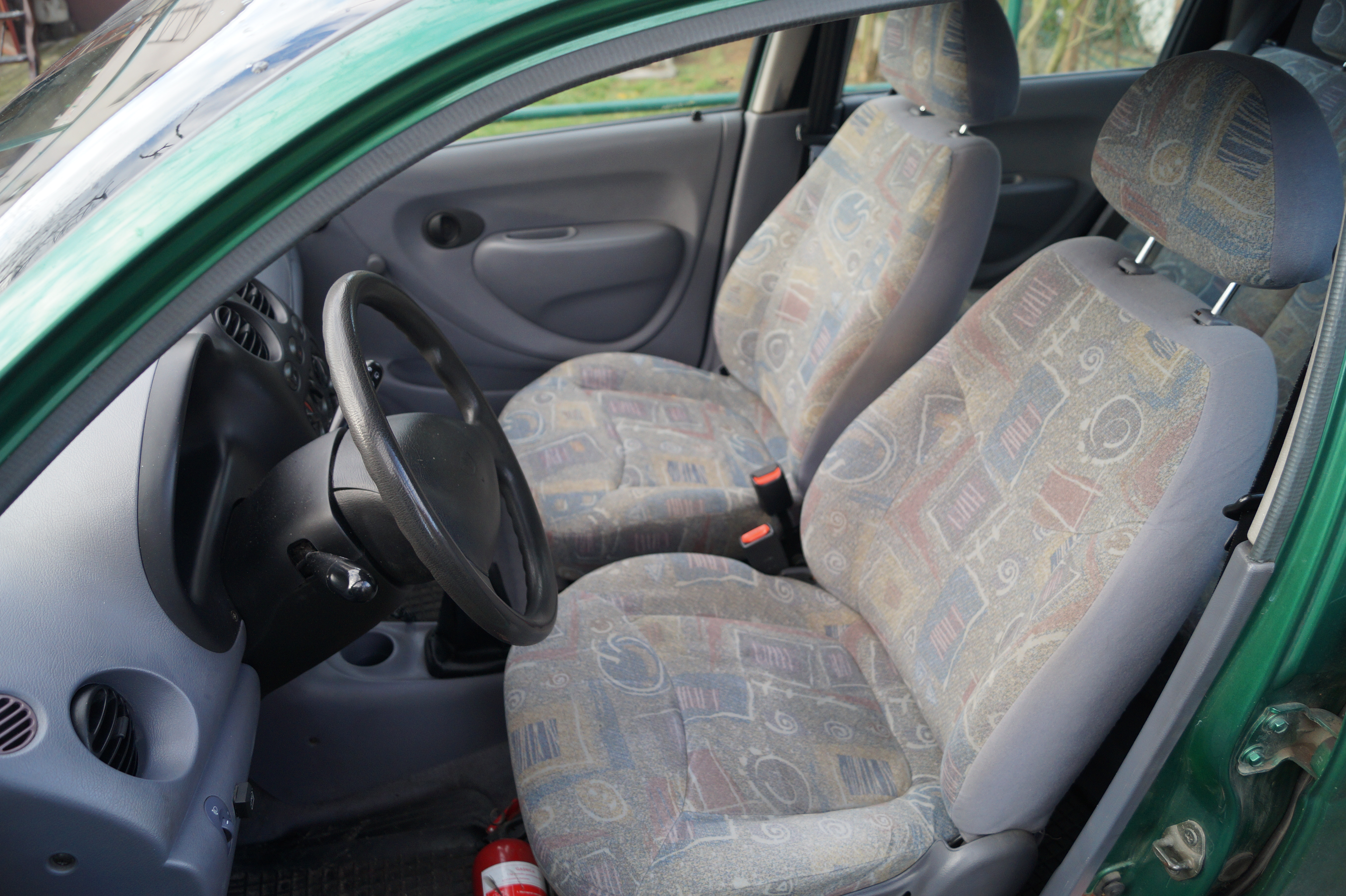 Wnętrze przednie Daewoo Matiza M100 w wersji Life